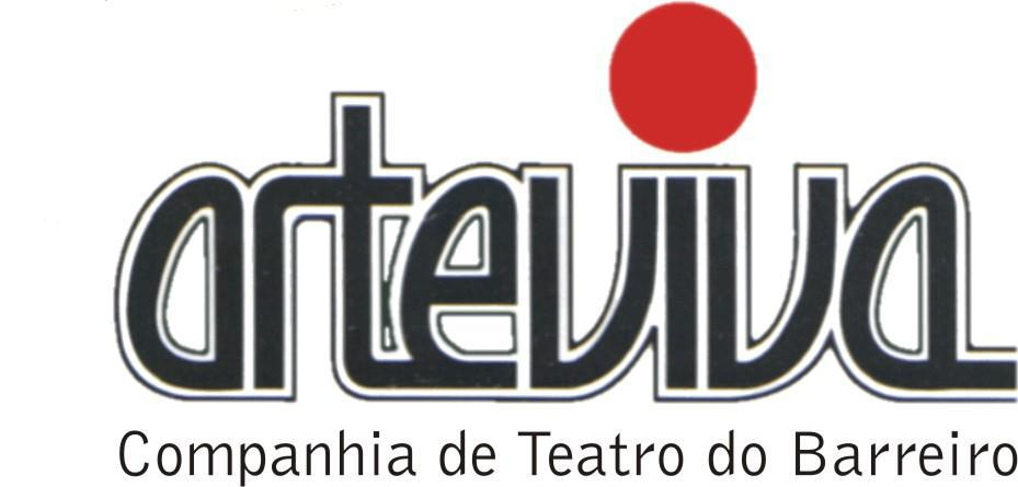 Logotipo